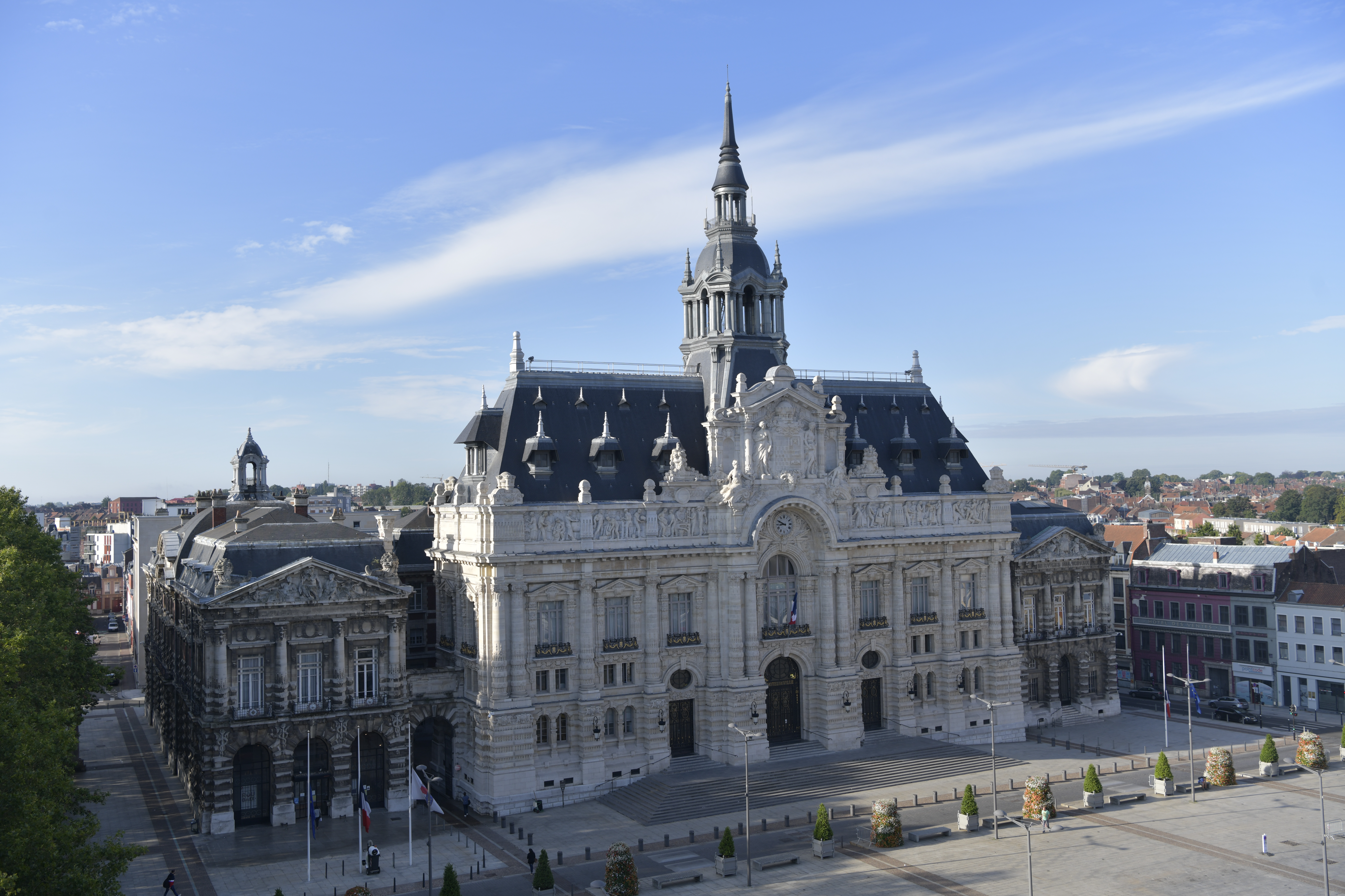 L'Hôtel de ville de Roubaix sur la grand-place dans le quartier du centre. Mairie. Bâtiment historique. Façade